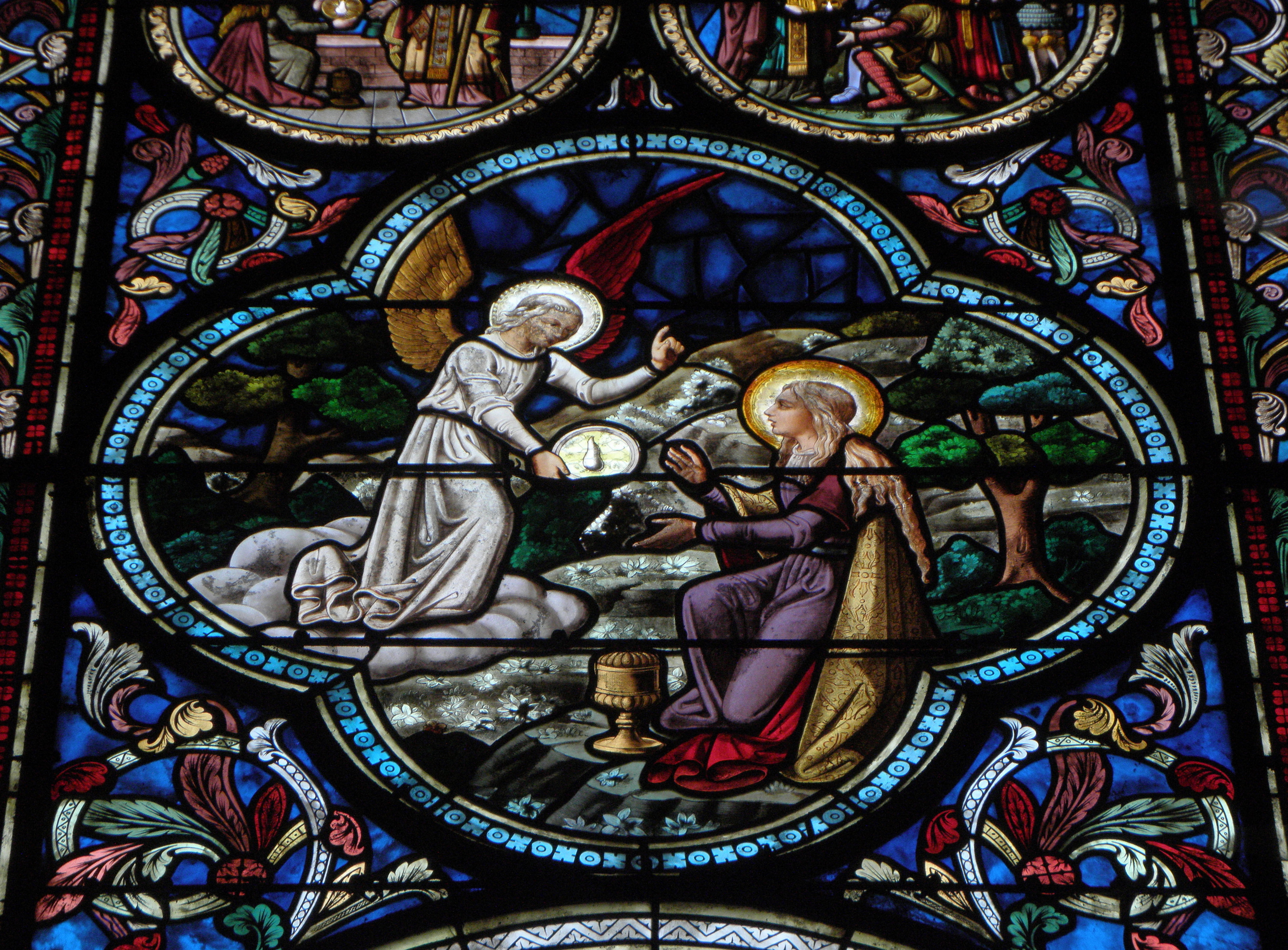 Église Notre-Dame la Neuve de Chemillé-Melay (49). Déambulatoire. Baie 05. Légende la Sainte-Larme. Un ange apparaît à Marie-Madeleine et lui confie les larmes du Christ.